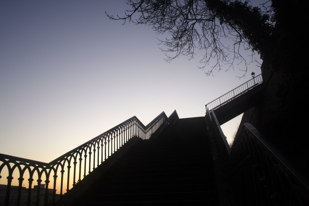 Escalier du Port de Commerce au Cours d'Ajot Brest